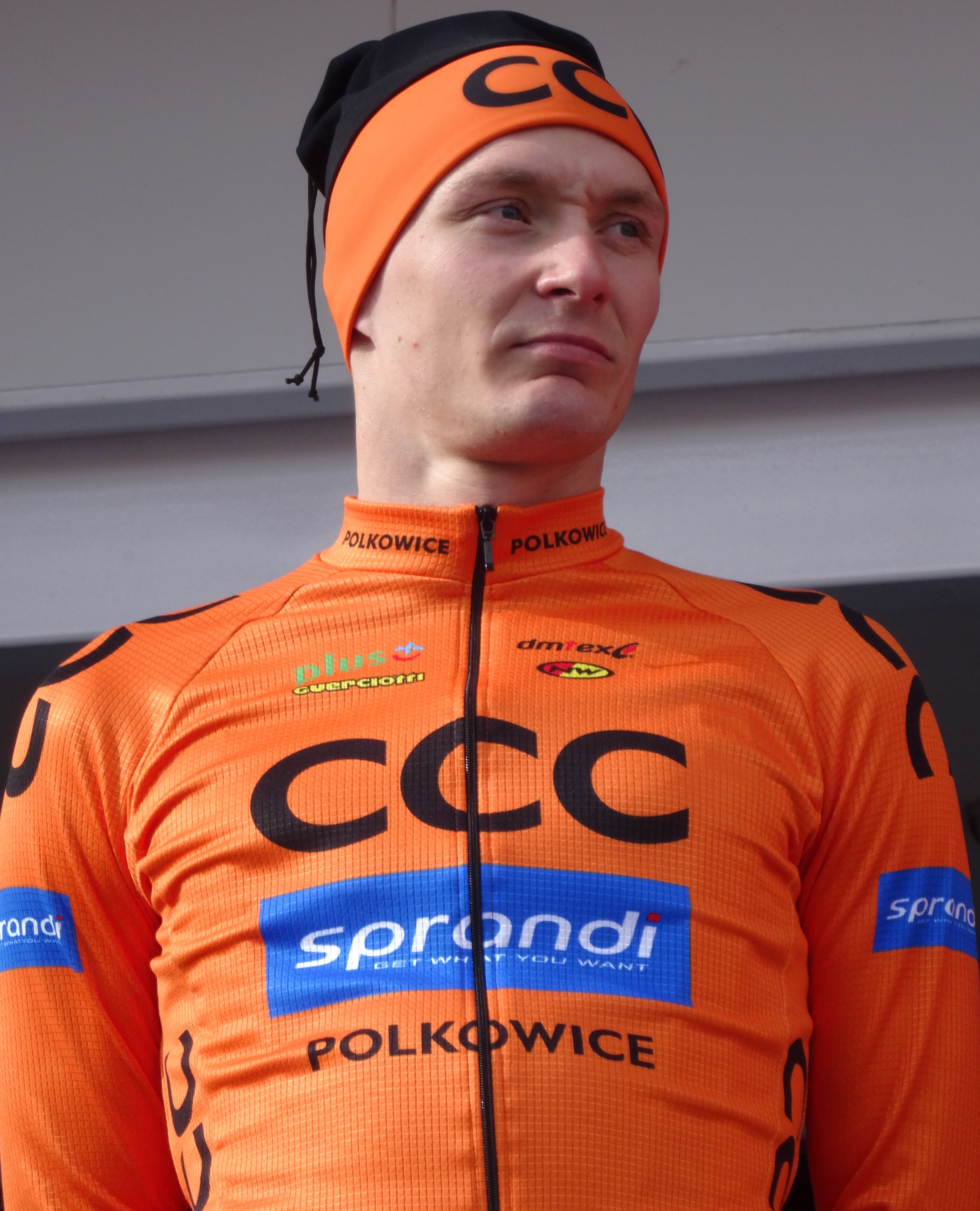 Reportage réalisé le mercredi 4 mars à l'occasion du départ du Samyn des Dames 2015 et du Samyn 2015 à Quaregnon, Belgique.